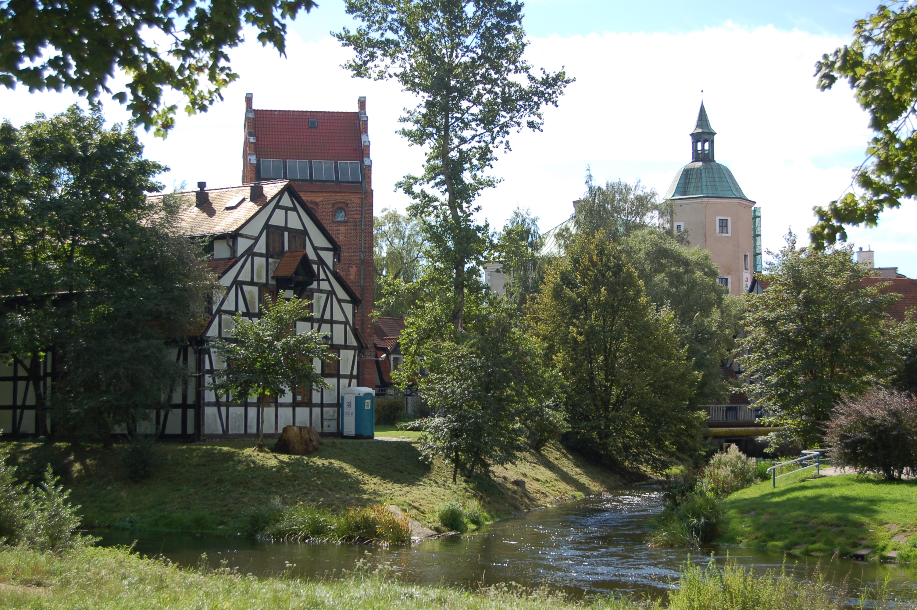 ul. Dominikańska w Słupsku